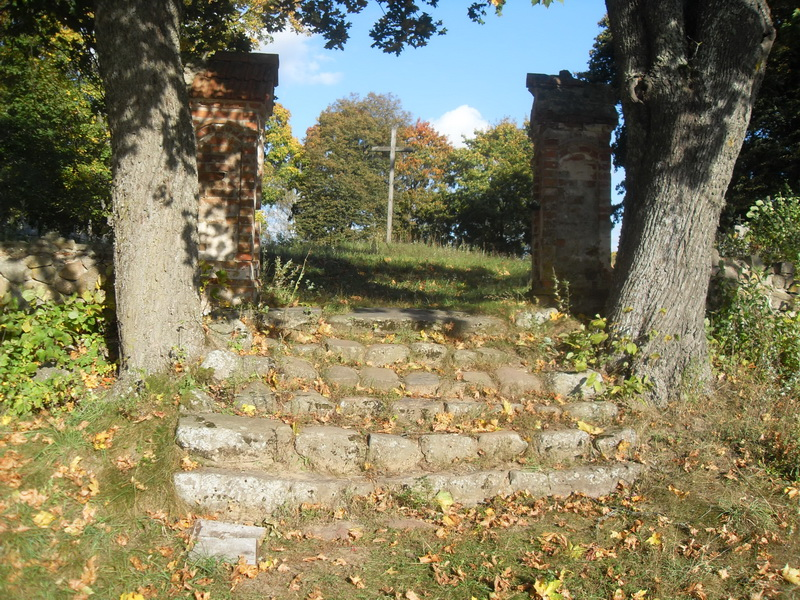 Сурвілішкі. Званіца на могілках